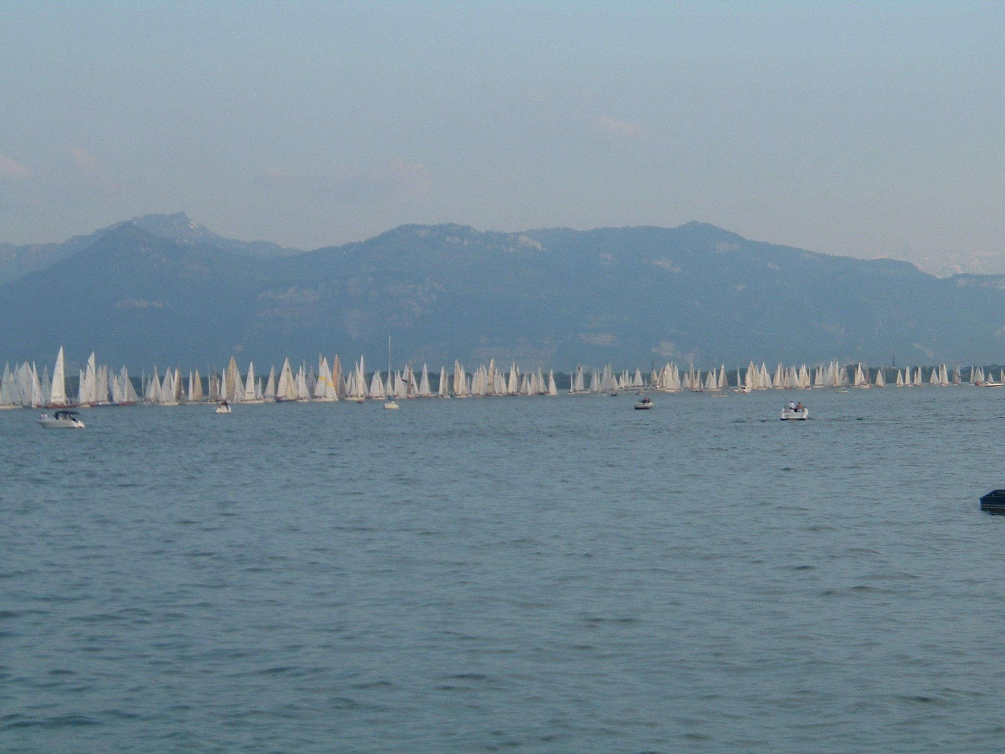 Rund um den Bodensee 2005: 500 Segelboote an der Startlinie